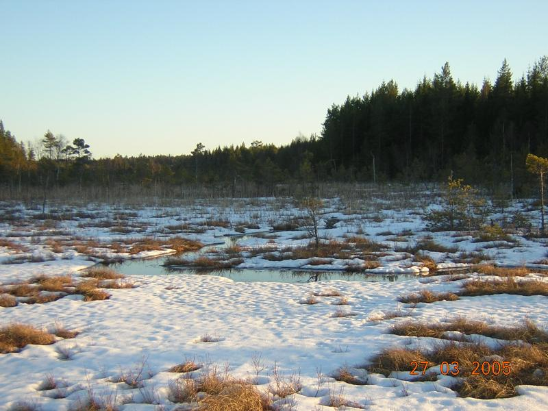 Samma bild som sv::Bild:DSCN0674.JPG men med ett ordentligt namn och mer komprimerad Fotograf: Användare:Fredriksson